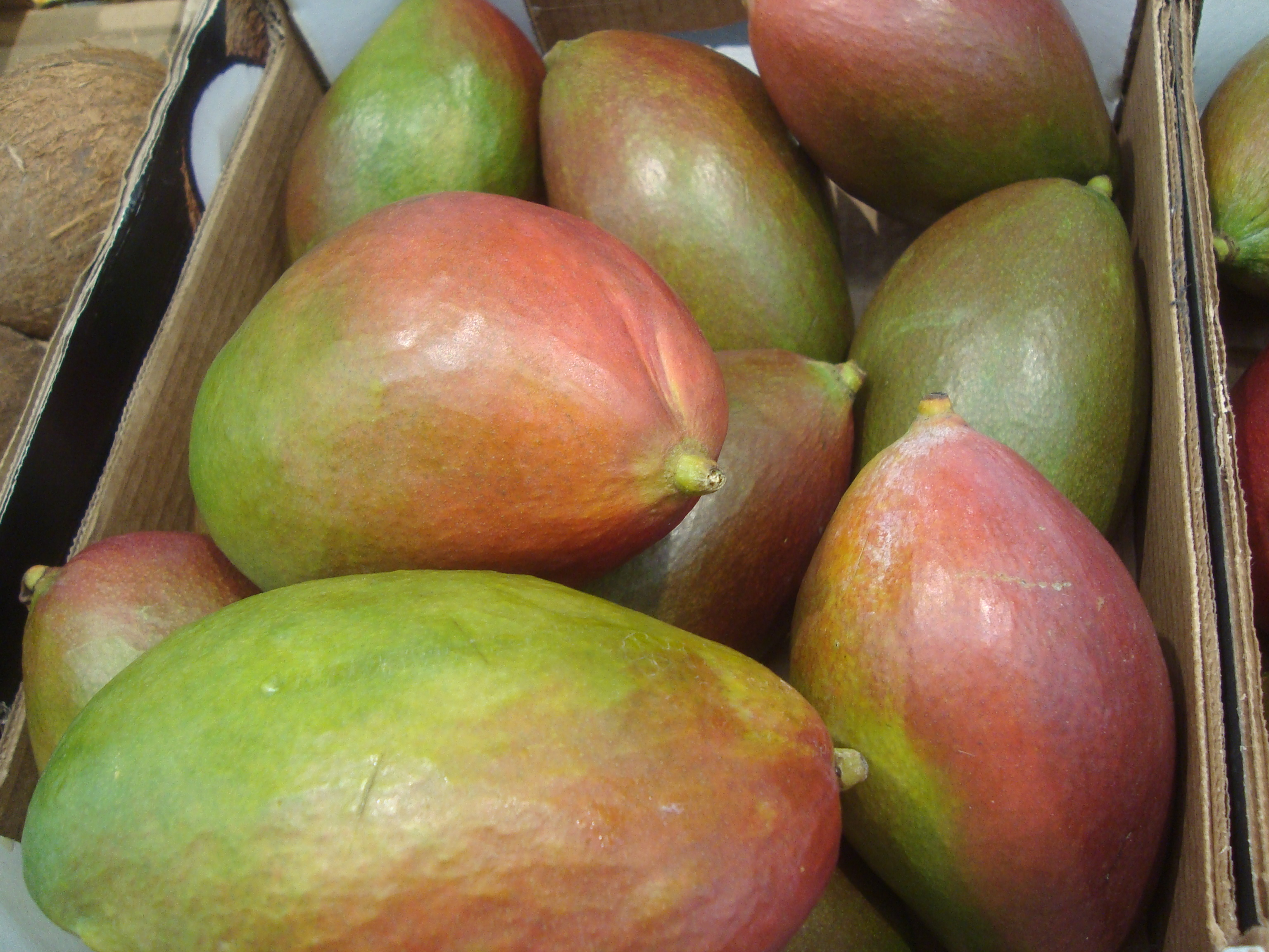 Mangos, frutas del género Mangifera.